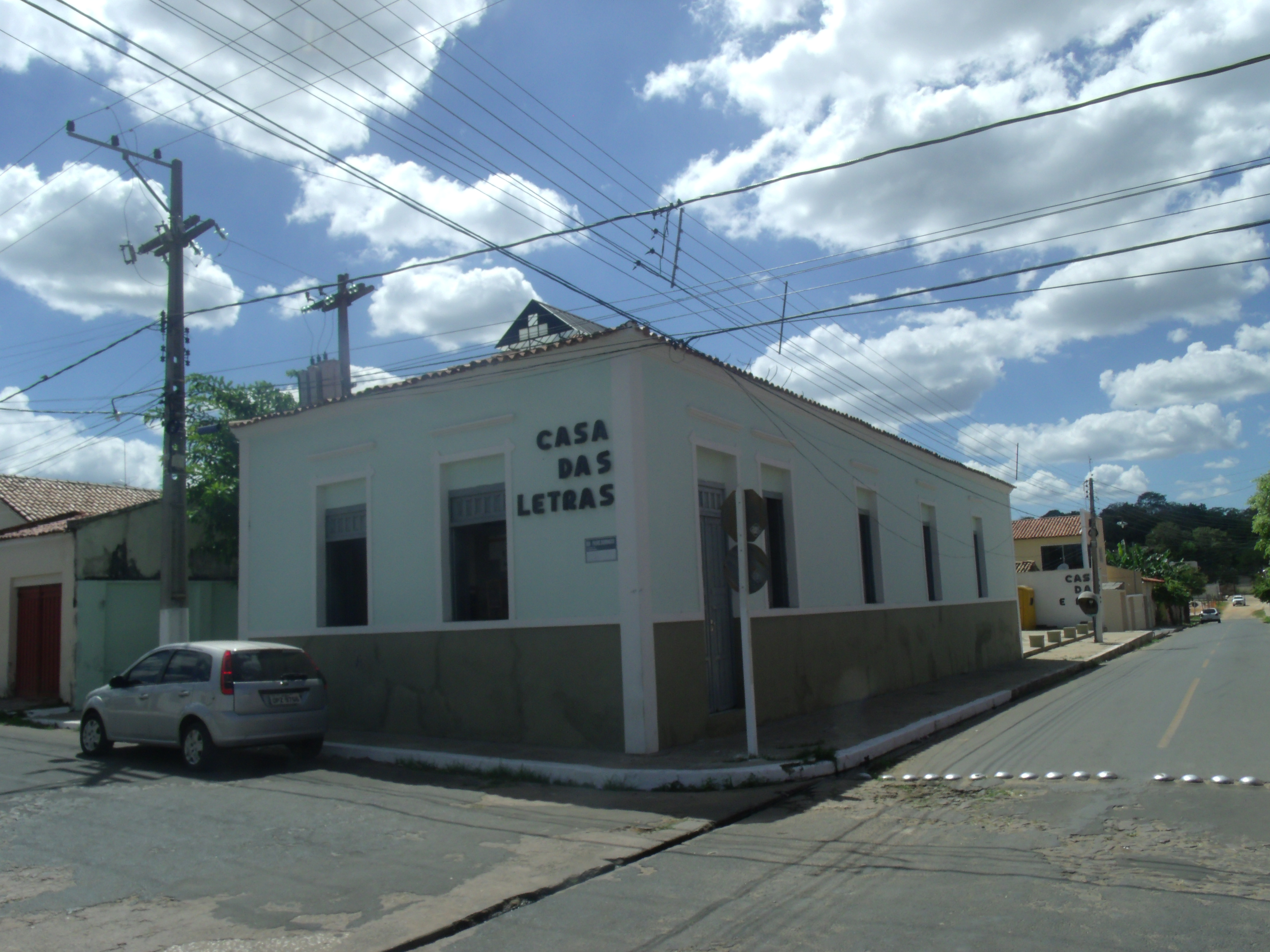 Vista de um dos lados do prédio da Biblioteca Municipal de Piripiri.